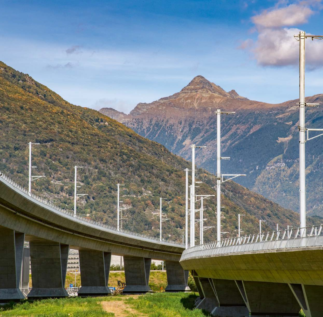 NEAT, Viadukt Camorino